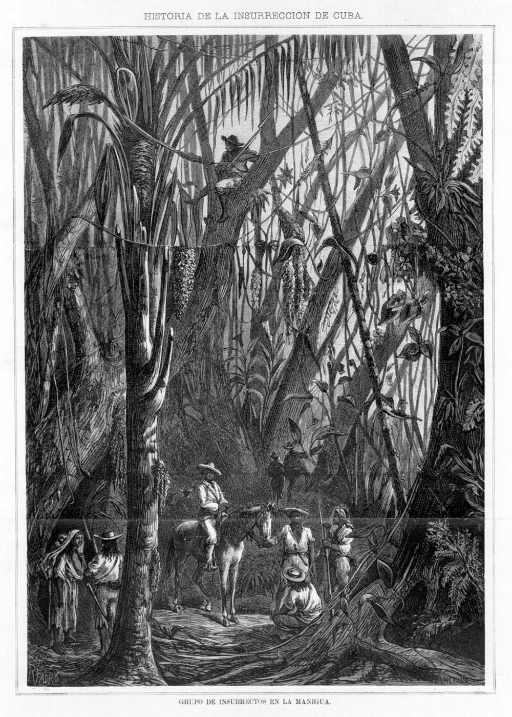 Mambises (Kubanische Freiheitskämpfer gegen Spanien) in den kubanischen Wäldern)